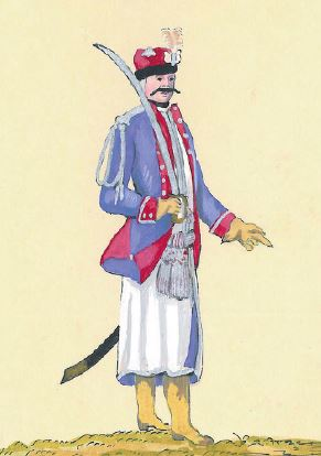 Brygadier Dzierski komendant 1 Brygady Kawalerii Narodowej (oficer 1 Brygady Kawalerii Narodowej Rafała Dzierżka